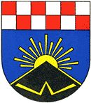 Wappen von Sonnenberg-Winnenberg